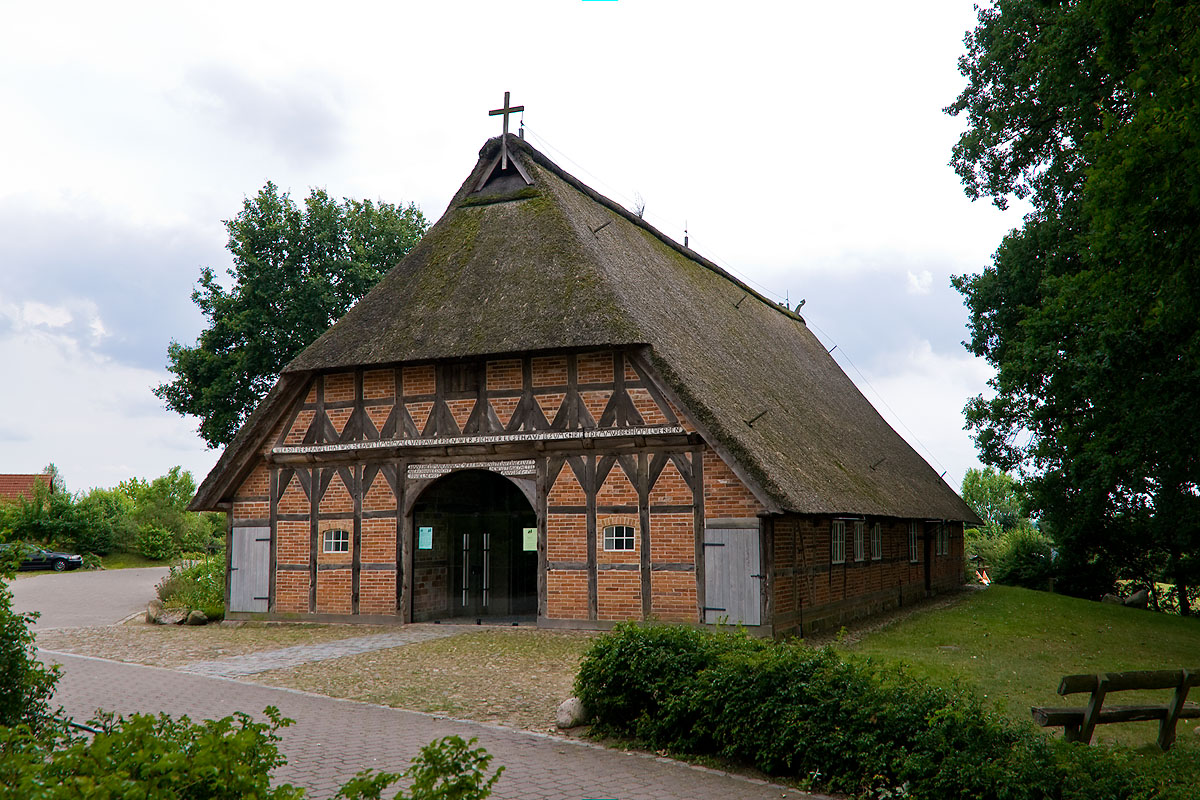 Die Martinuskirche in Deutsch Evern, Niedersachsen, ist ein über 350 Jahre altes Zweiständerhaus. Das 1665 erbaute Fachwerkgebäude war ursprünglich ein Bauernhaus.